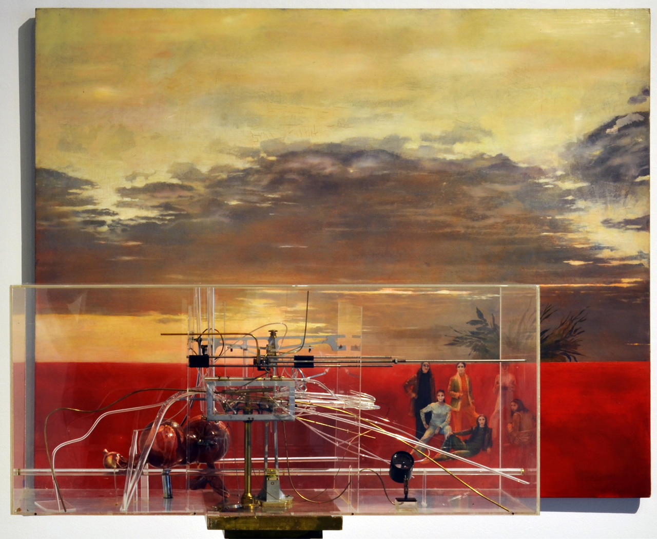 Bedřich Dlouhý, Krajina (1971), kombinovaná technika, sololit, dřevo, kov, plexisklo, Galerie moderního umění v Roudnici nad Labem